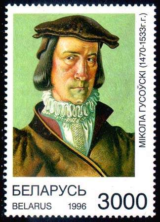 Беларуская (тарашкевіца): Мікола Гусоўскі. Белпошта